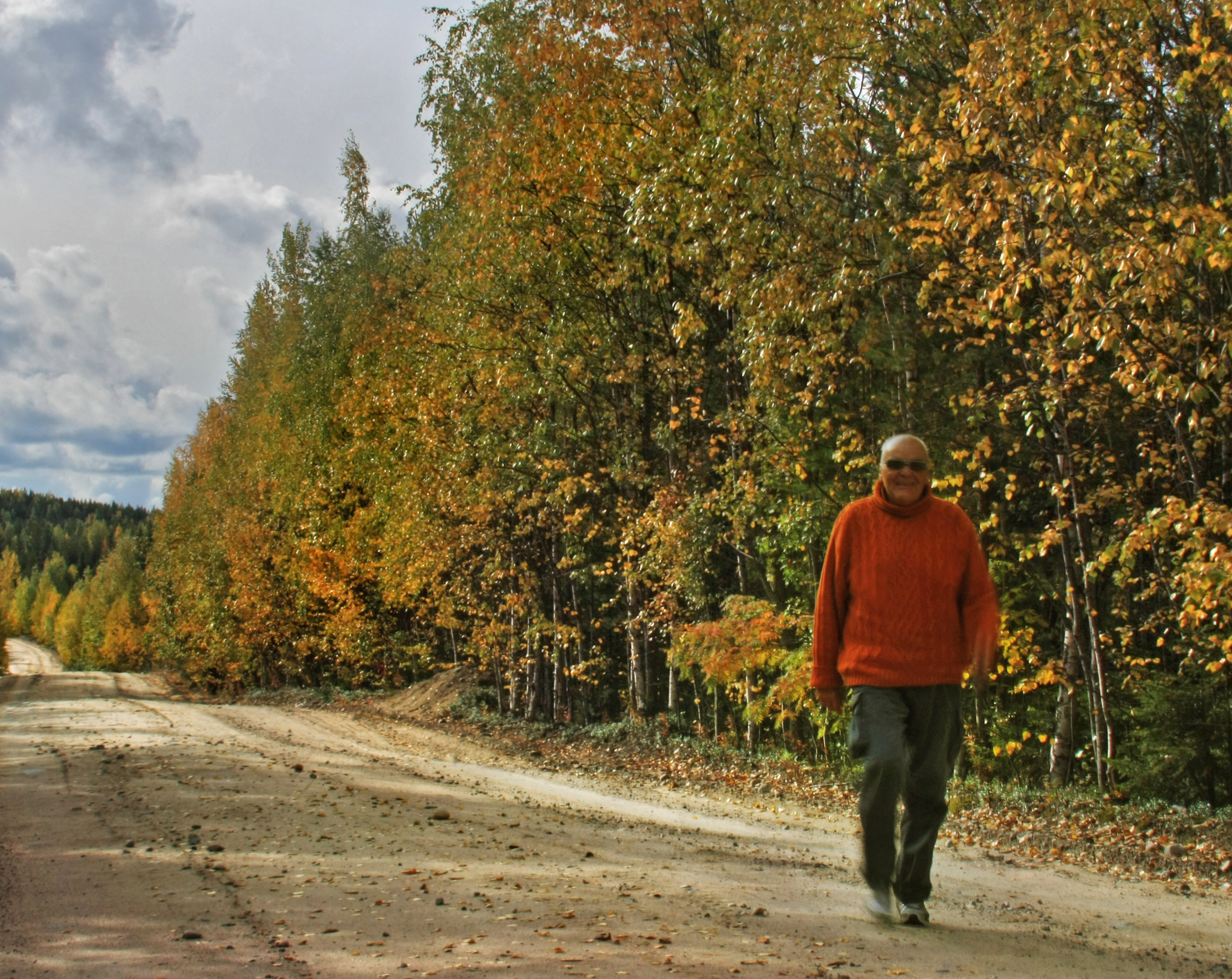 Autoportree